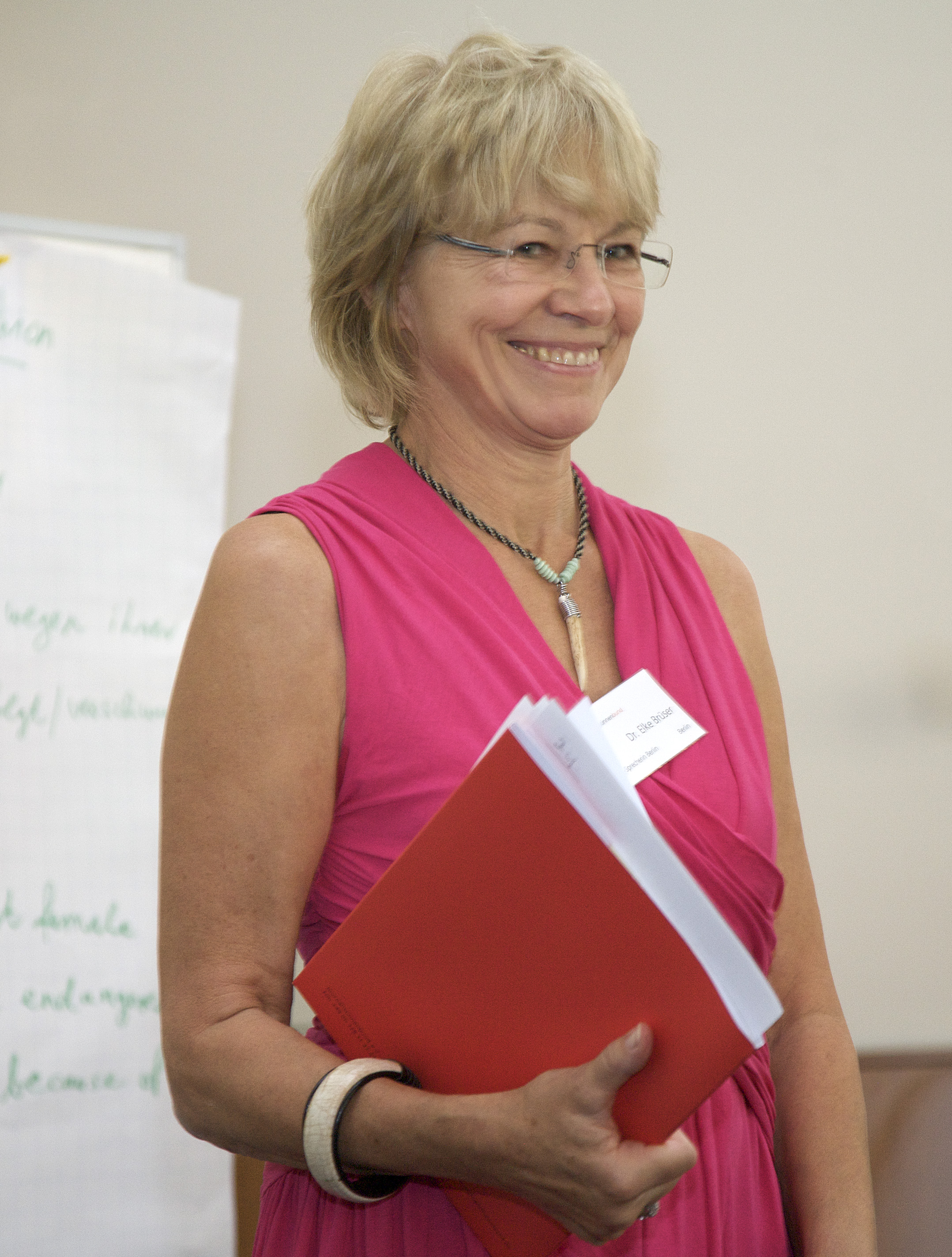 Porträt